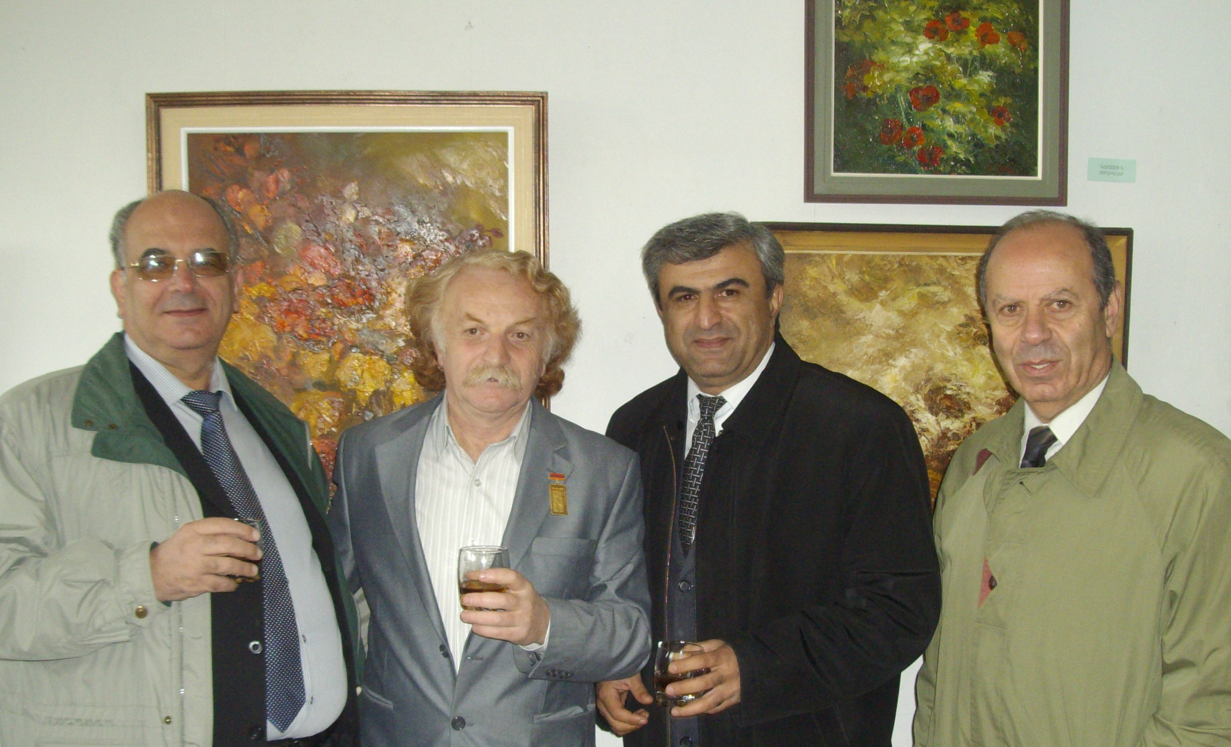 Ազատ Վարդանյան, ԱԼՓԱ, Մ. Միրիջանյան, Կարեն Աղամյան